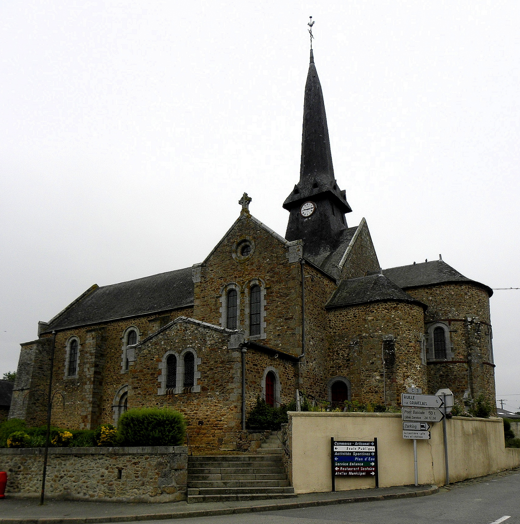 Église Saint-Martin de Montjean (53). Vue méridionale.